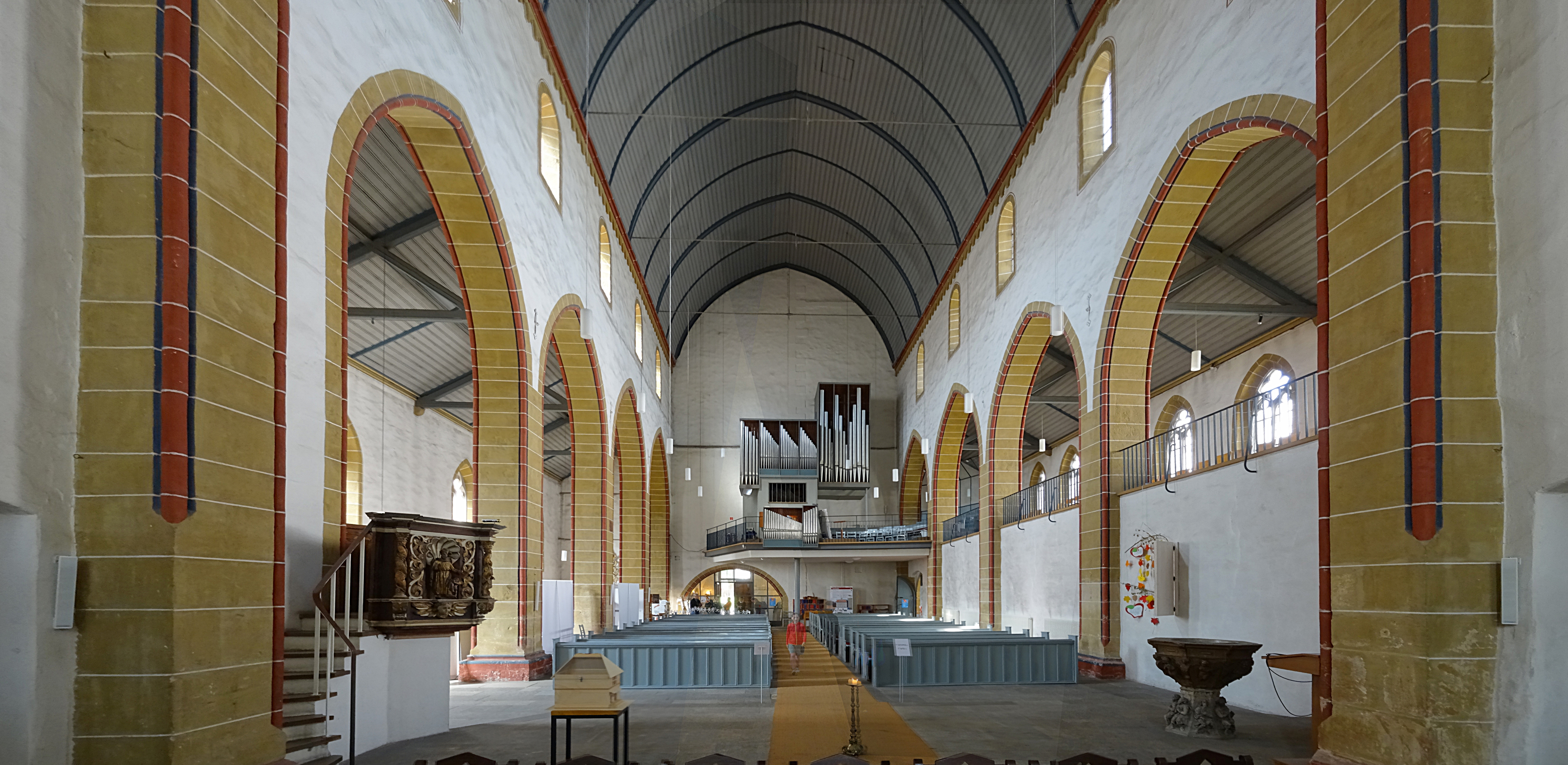 Innenraum Panorama der Reglerkirche in Erfurt